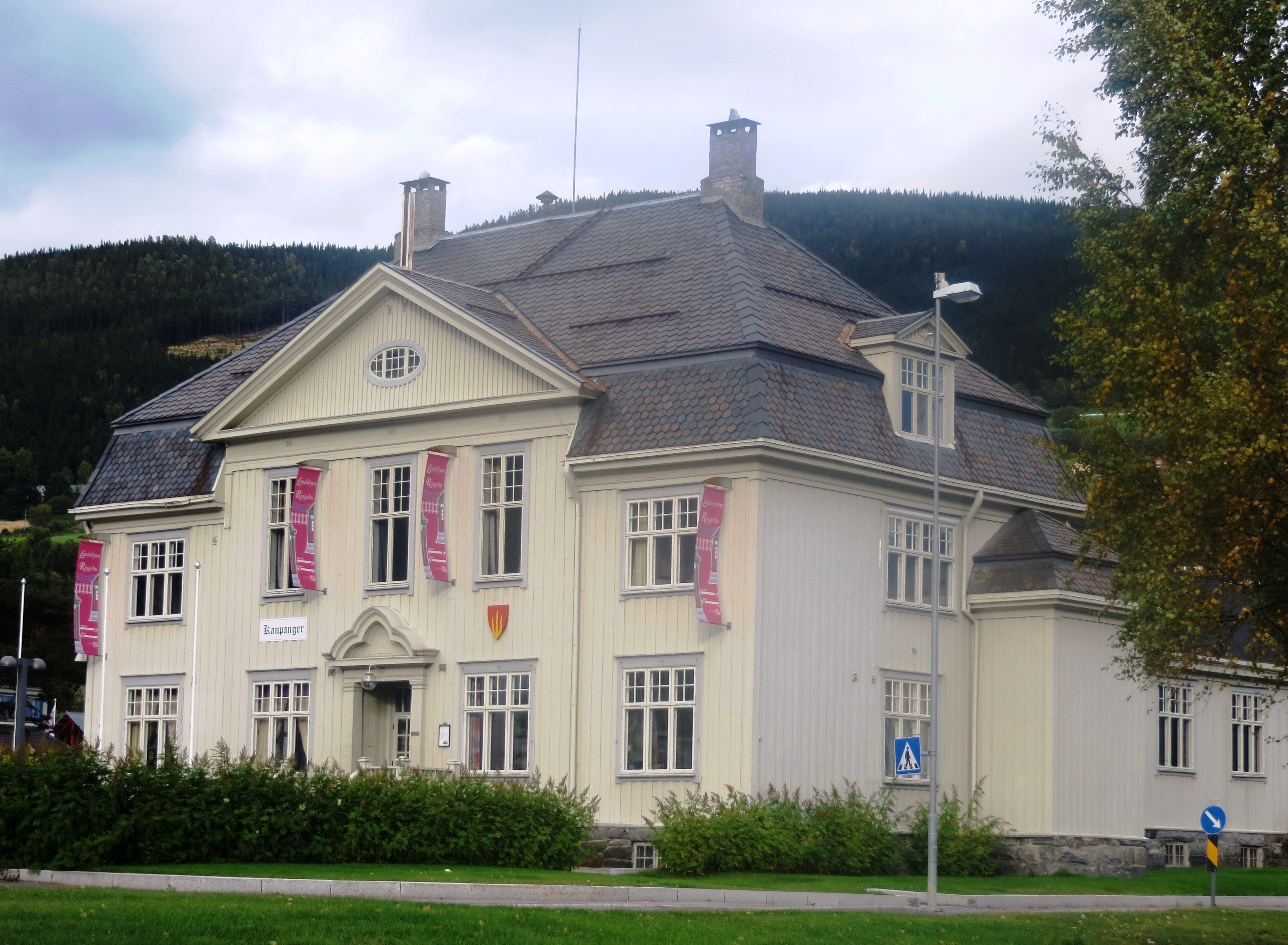 det gamle herreds- og skysshuset "Kaupanger" i sentrum av Ringebu, Gudbrandsdalen i Oppland.